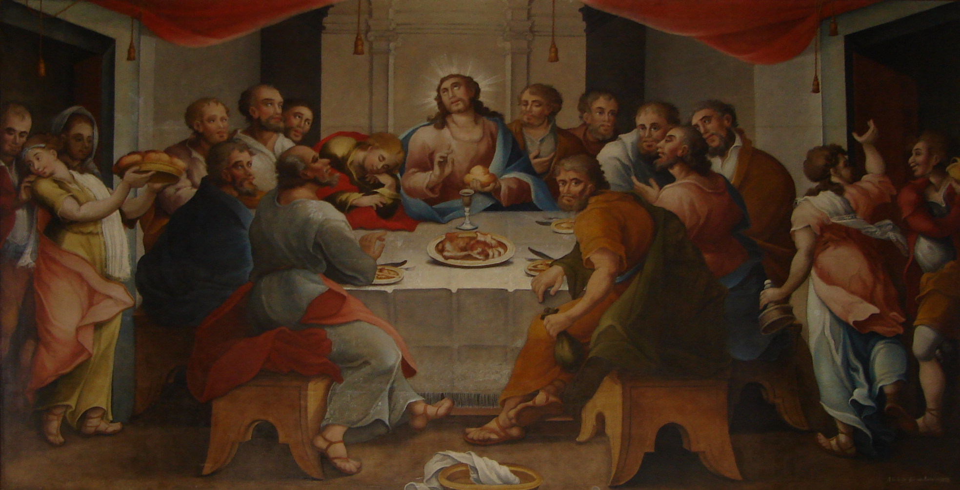 Santa Ceia de Manuel da Costa Ataide